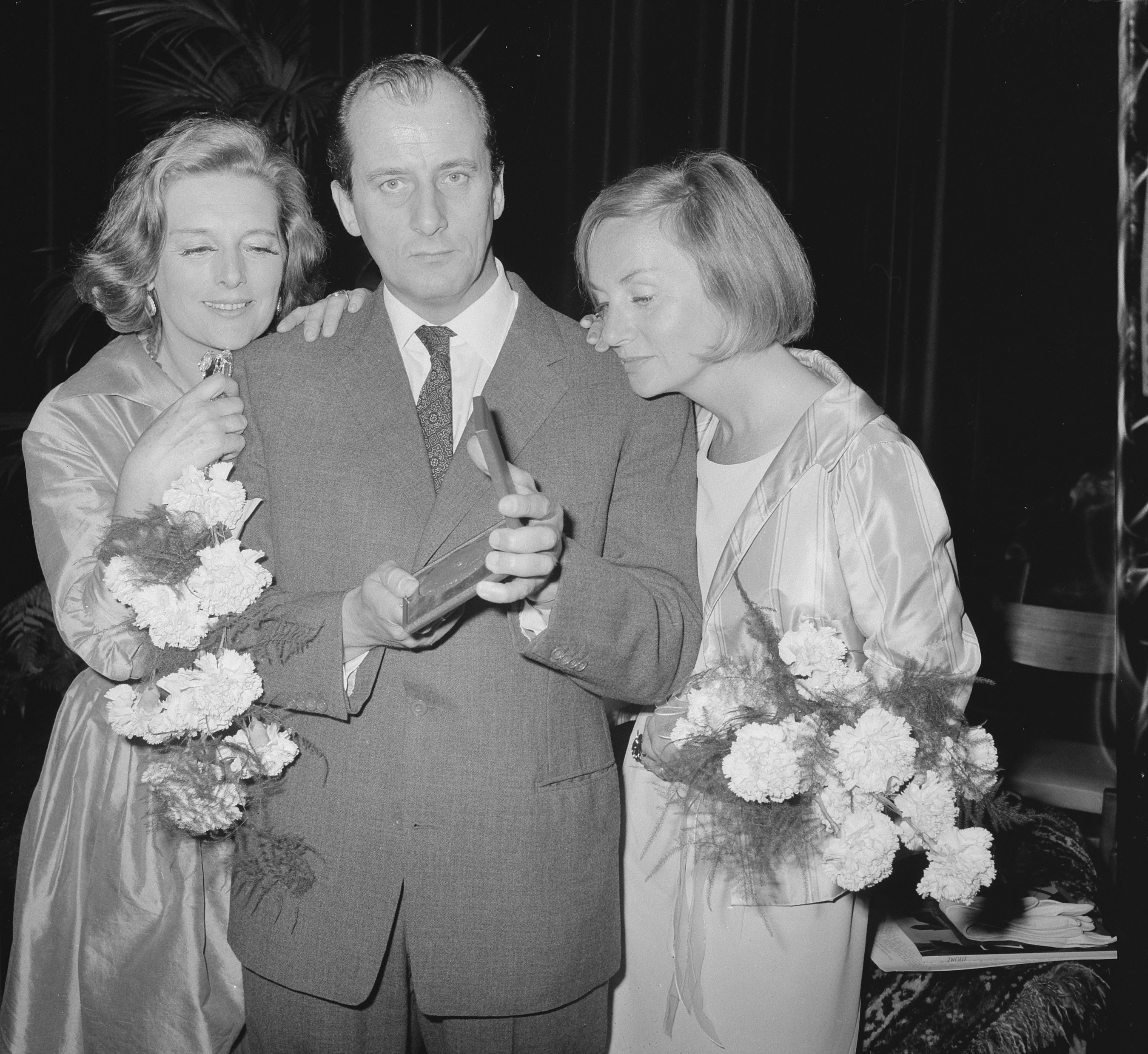 Louis d'Or prijs 1963 voor Guus Hermus als beste mannelijke toneelspeler, door burgemeester van Zwolle uitgereikt, in het middden Guus Hermus, links Ank van der Moer en rechts Andrea Domburg